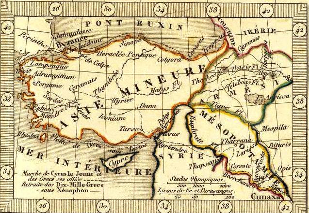 Carte generale de l'Asie-Mineure, de l'Armenie, de la Syrie, de la Mesopotamie, du Caucase &a. par A. Brue, Geographe du Roi. (with) Etat de l'Asie avant Cyrus et limites de l'Empire des Perses a la mort de ce Prince (560 et 579 av. J.C.). (with) Marche de Cyrus le Jeune et des Grecs ses allies, retraite des dix-mille Grecs sous Xenophon. (with) Colonies de Pheniciens de 20e . au 5e. siecles avant J.C. Revue, completee et augmentee de cartes particulieres par Ch. Picquet , Geographe du Roi et de Mgr. le Duc d'Orleans. Paris, 1839. Chez Chles. Picquet, Quai Conti No. 17, pres du Pont des Arts.